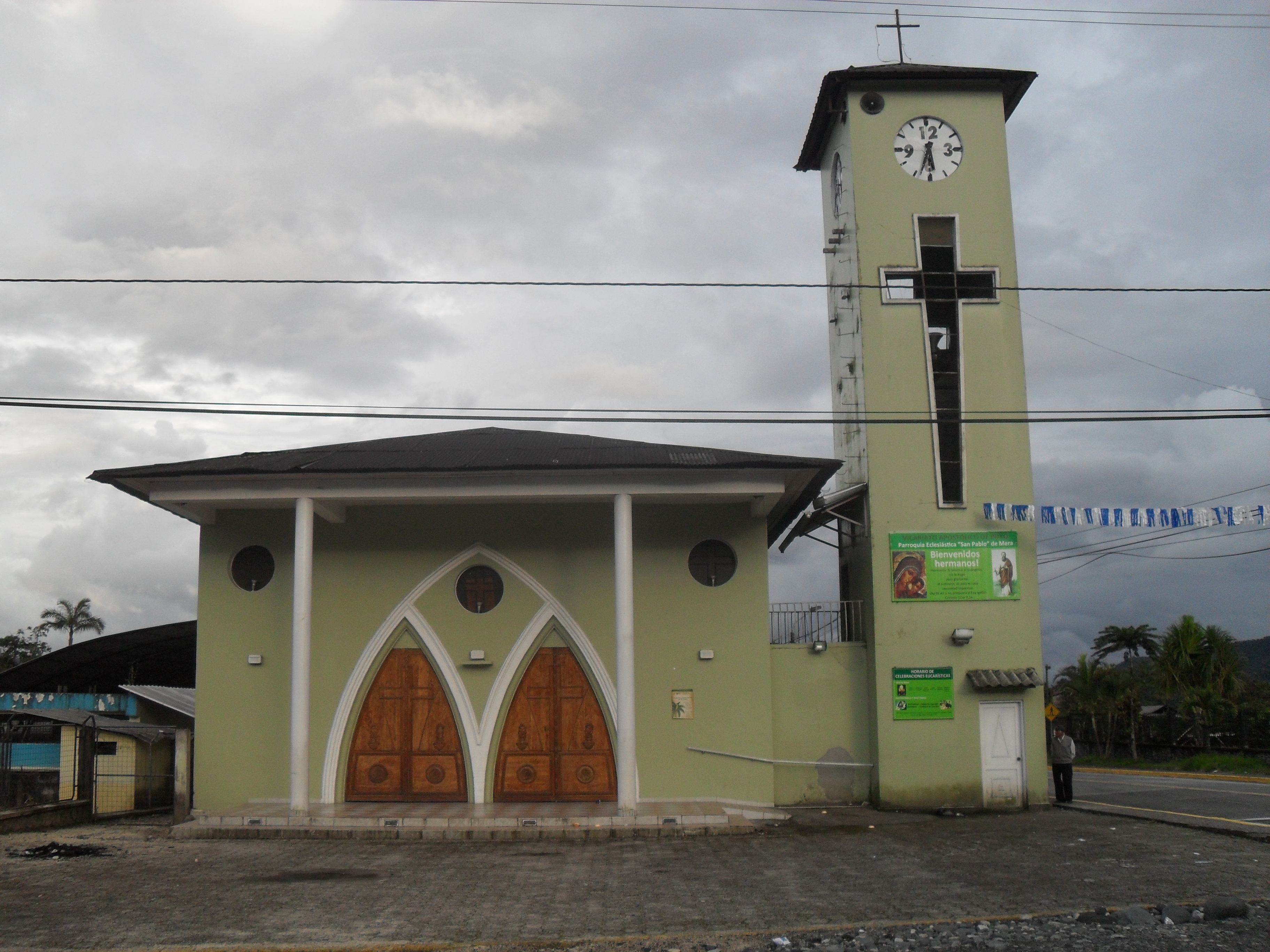 catedral de MERA